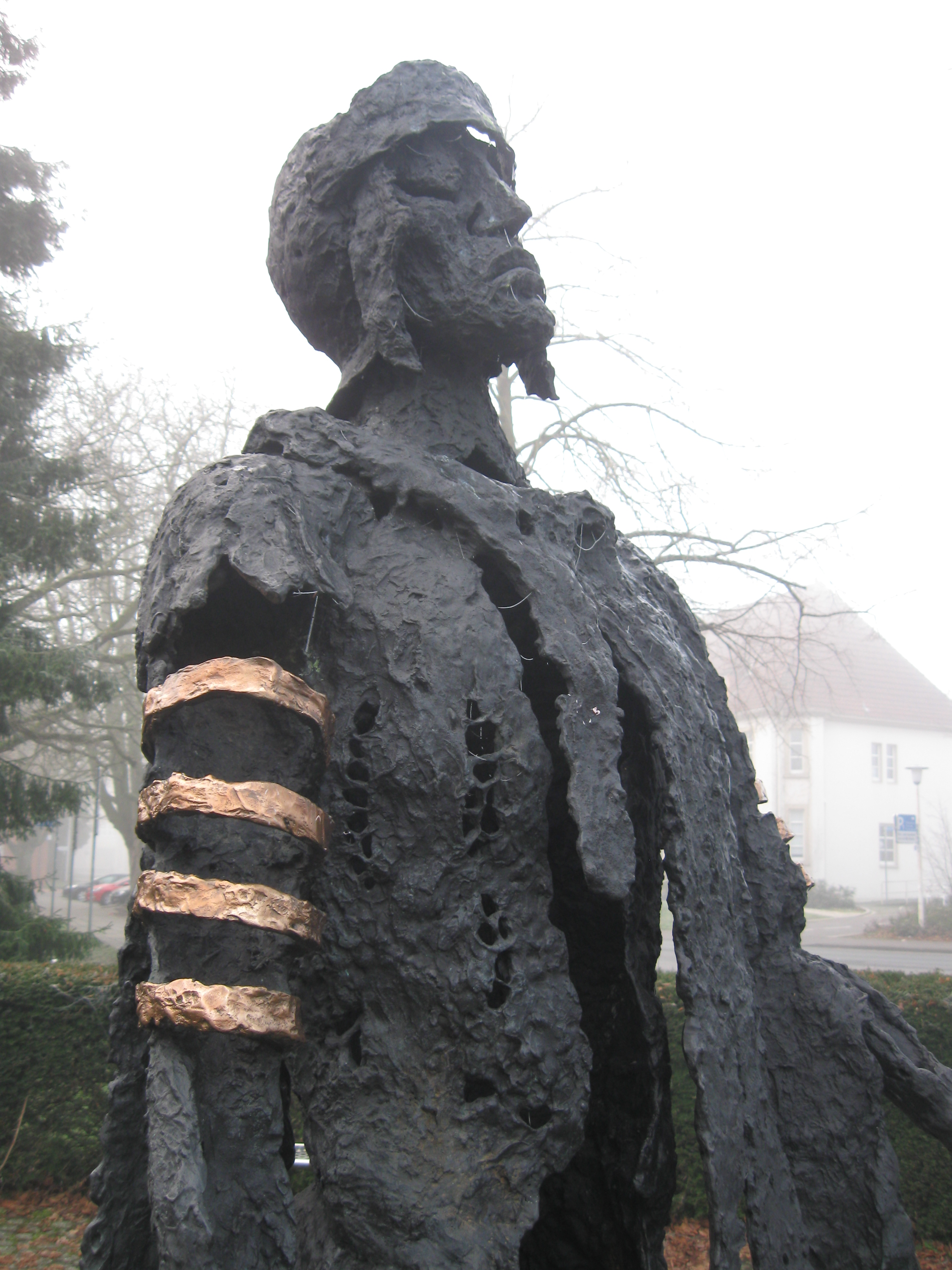 Detalle de la figura de Publio Quintilio Varo después de la derrota, en Haltern del Lago, Alemania (el antiguo Aliso, sobre el río Lupio)